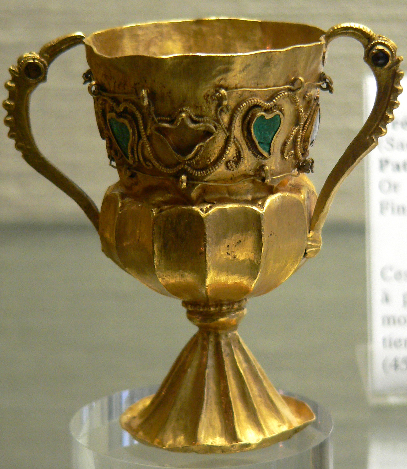 Trésor de Gourdon, calice Trésor découvert près de Gourdon (Saône-et-Loire), en 1845. Or, turquoise et grenats, fin du Ve-début du VIe siècle.